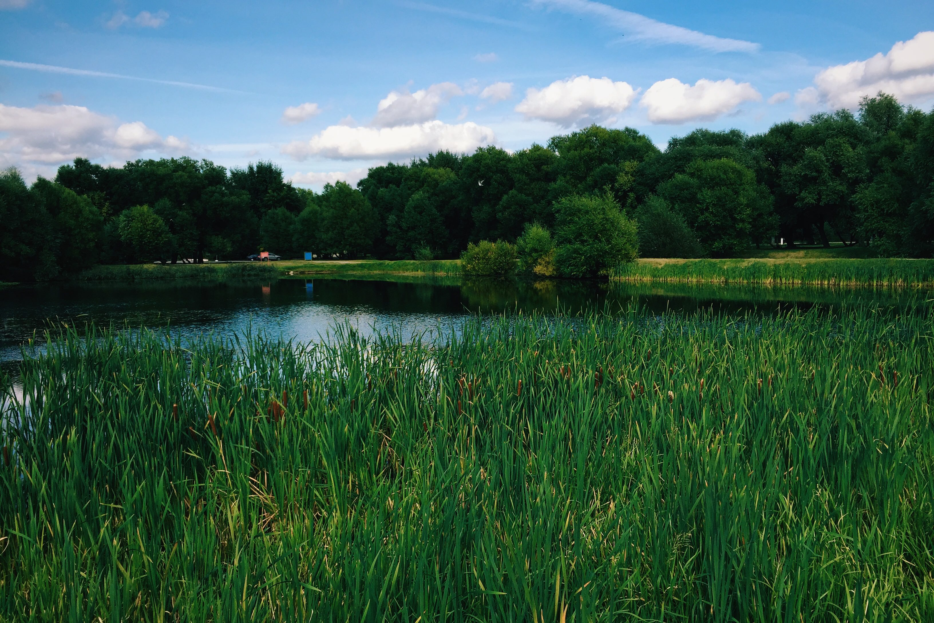 Лефортовский парк Moscow in 2015; Москва в 2015